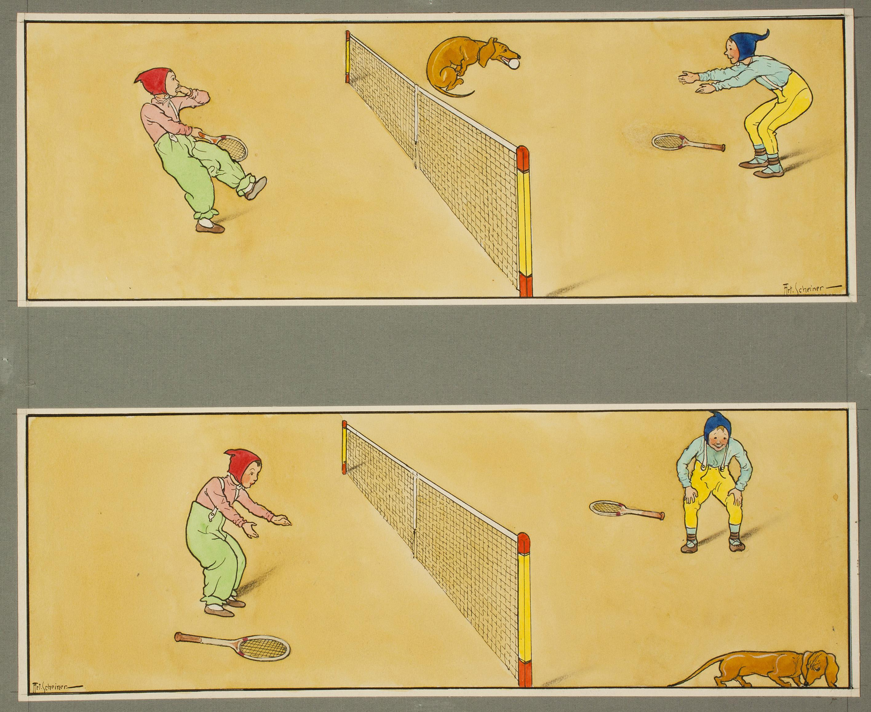 Kleiner Schlingel Kulihrášek als Tennisspieler II, zwei Zeichnungen, auf Papierunterlage doubliert, beide vom Autor signiert, Tusche und Aquarellfarben/Papier, 12 x 35 cm